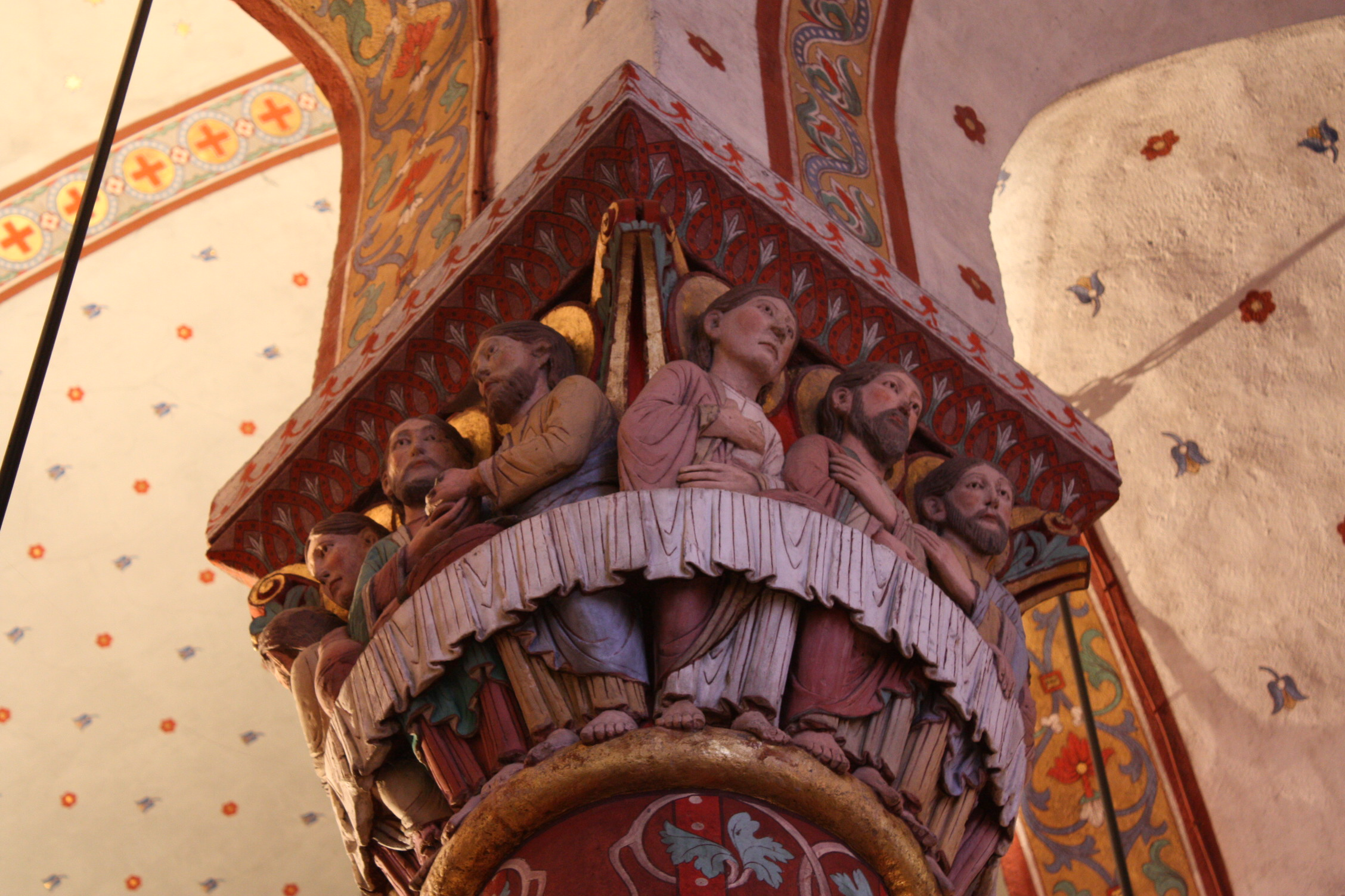 Voir aussi : timbre français de 1973, représentant le chapiteau